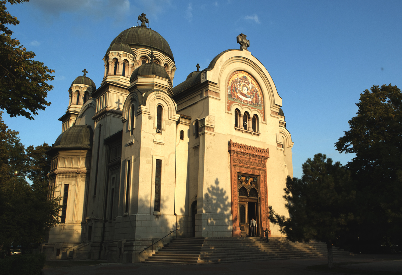 Centrul istoric al municipiului Craiova